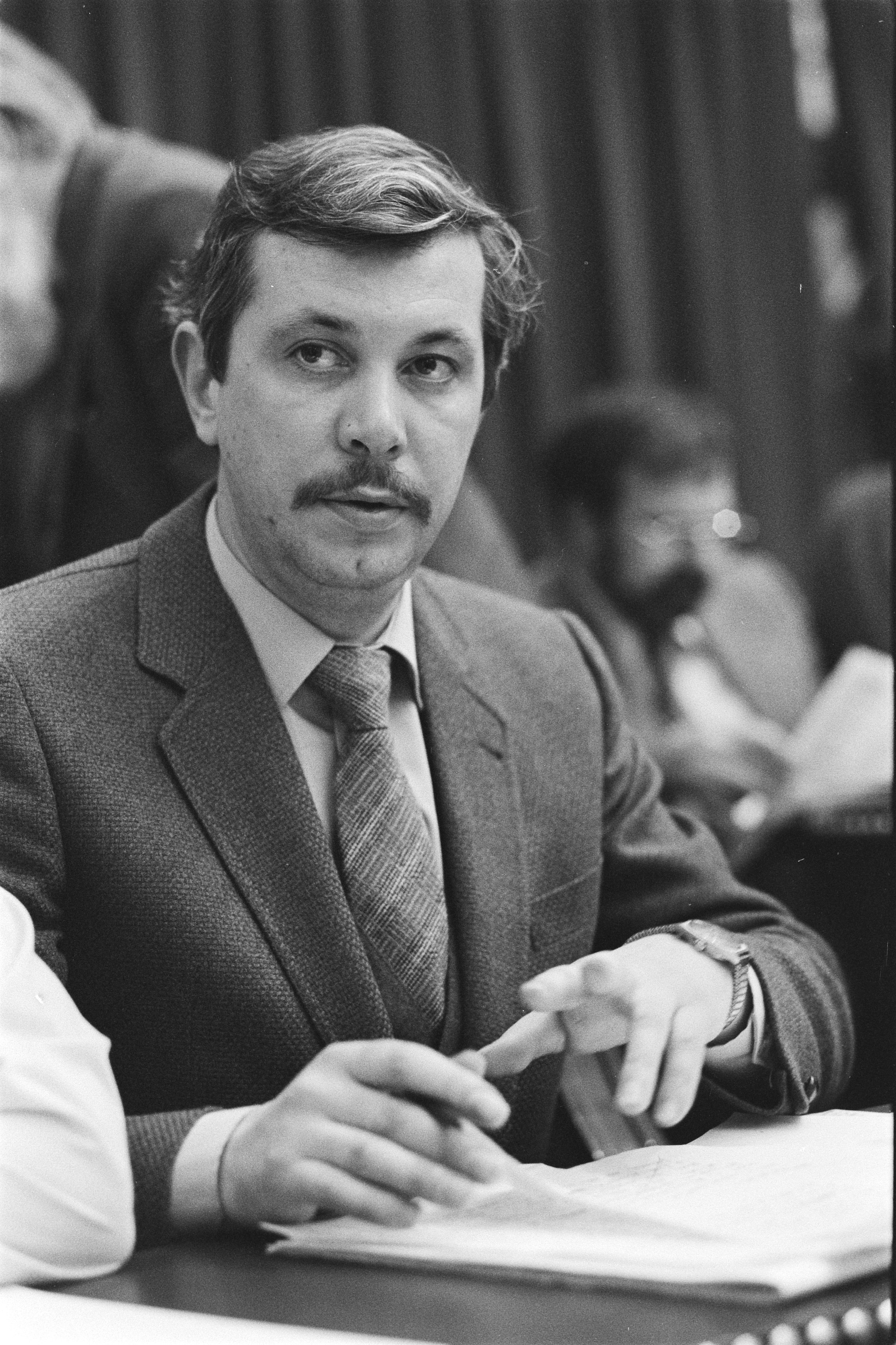 Collectie / Archief : Fotocollectie Anefo Reportage / Serie : [ onbekend ] Beschrijving : Nieuw Tweede Kamerlid H. Veldhoen (PvdA) Datum : 5 februari 1980 Locatie : Den Haag, Zuid-Holland Trefwoorden : parlementariërs, politiek, portretten Persoonsnaam : Veldhoen, Henk Instellingsnaam : PvdA, Tweede Kamer Fotograaf : Suyk, Koen / Anefo Auteursrechthebbende : Nationaal Archief Materiaalsoort : Negatief (zwart/wit) Nummer archiefinventaris : bekijk toegang 2.24.01.05 Bestanddeelnummer : 930-6569